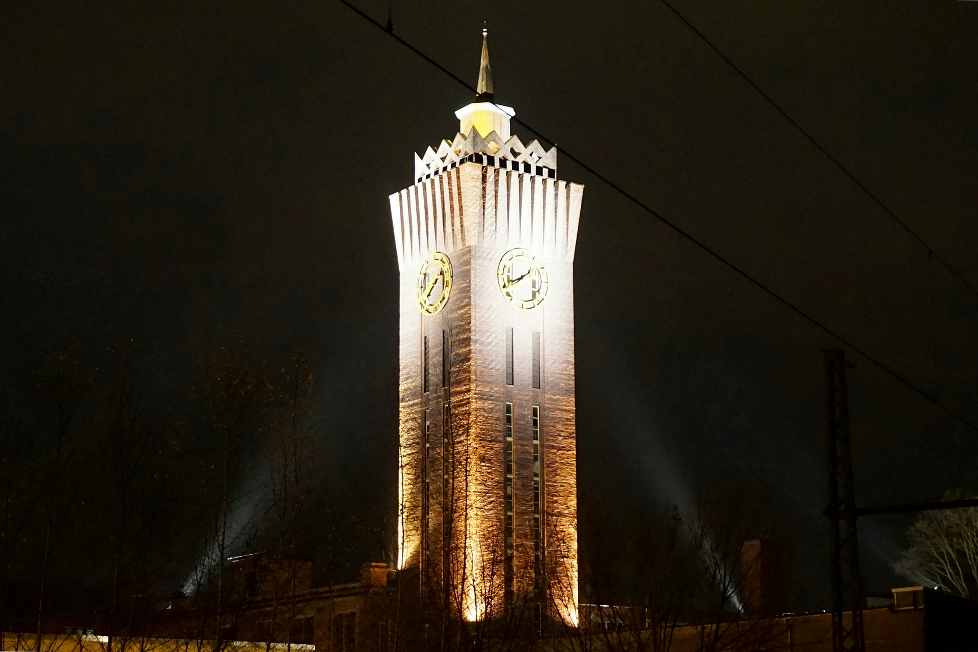 Der Aufzugs- und Uhrturm der ehemaligen Schubert & Salzer AG in Chemnitz bei Nacht im Jahr 2015.